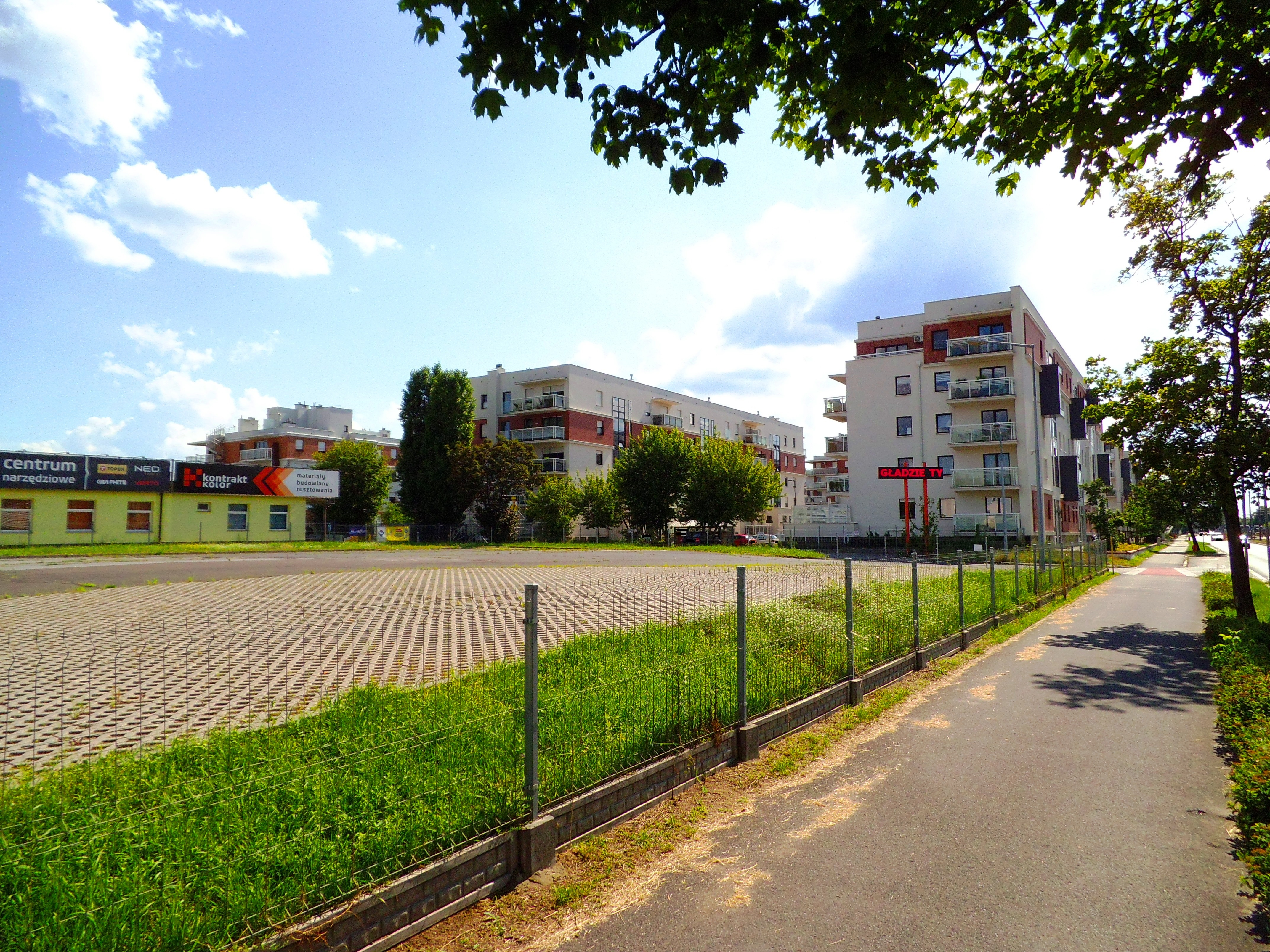 Parking Toruń Pacific w Toruniu